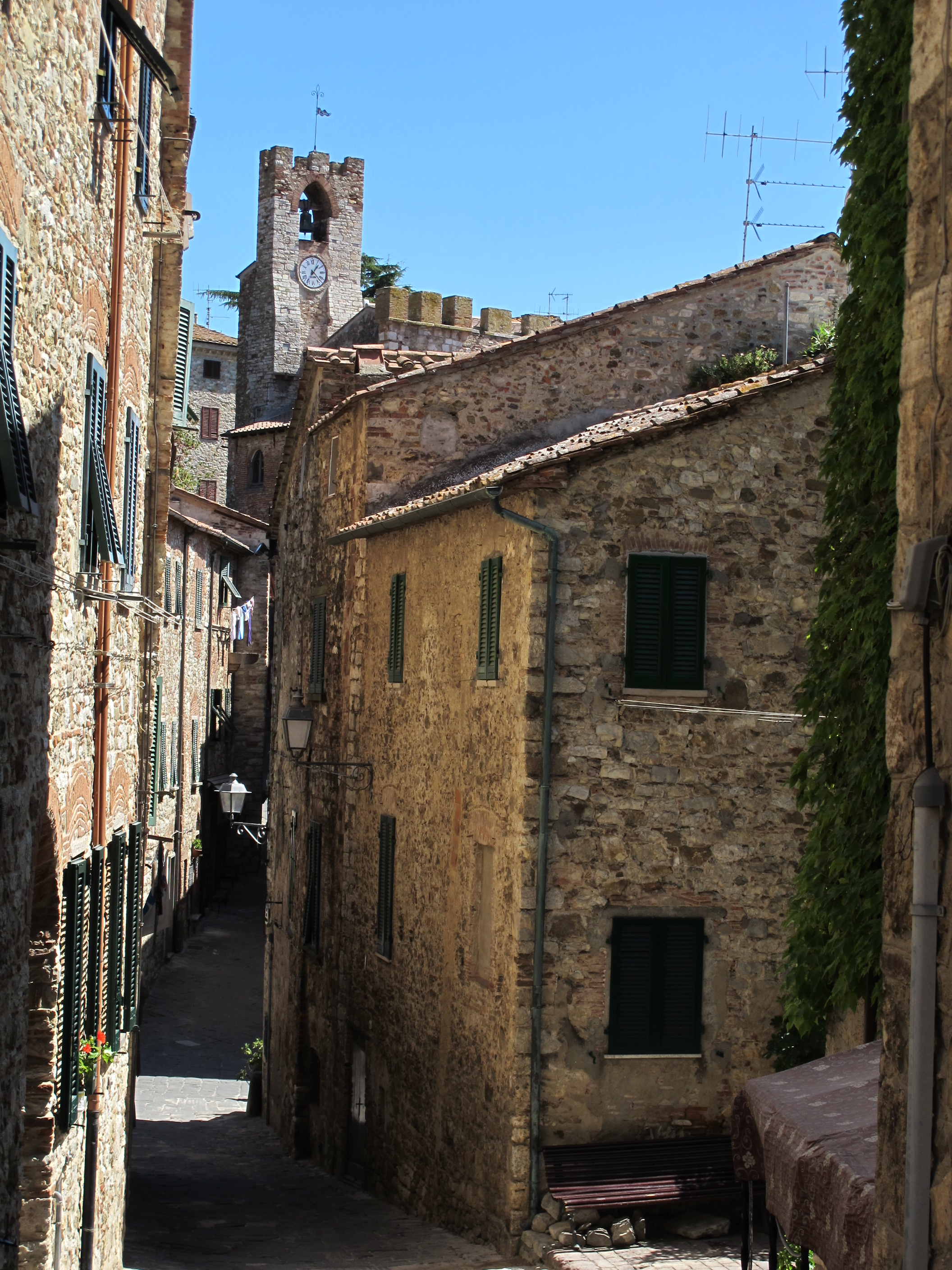 Suvereto, strada